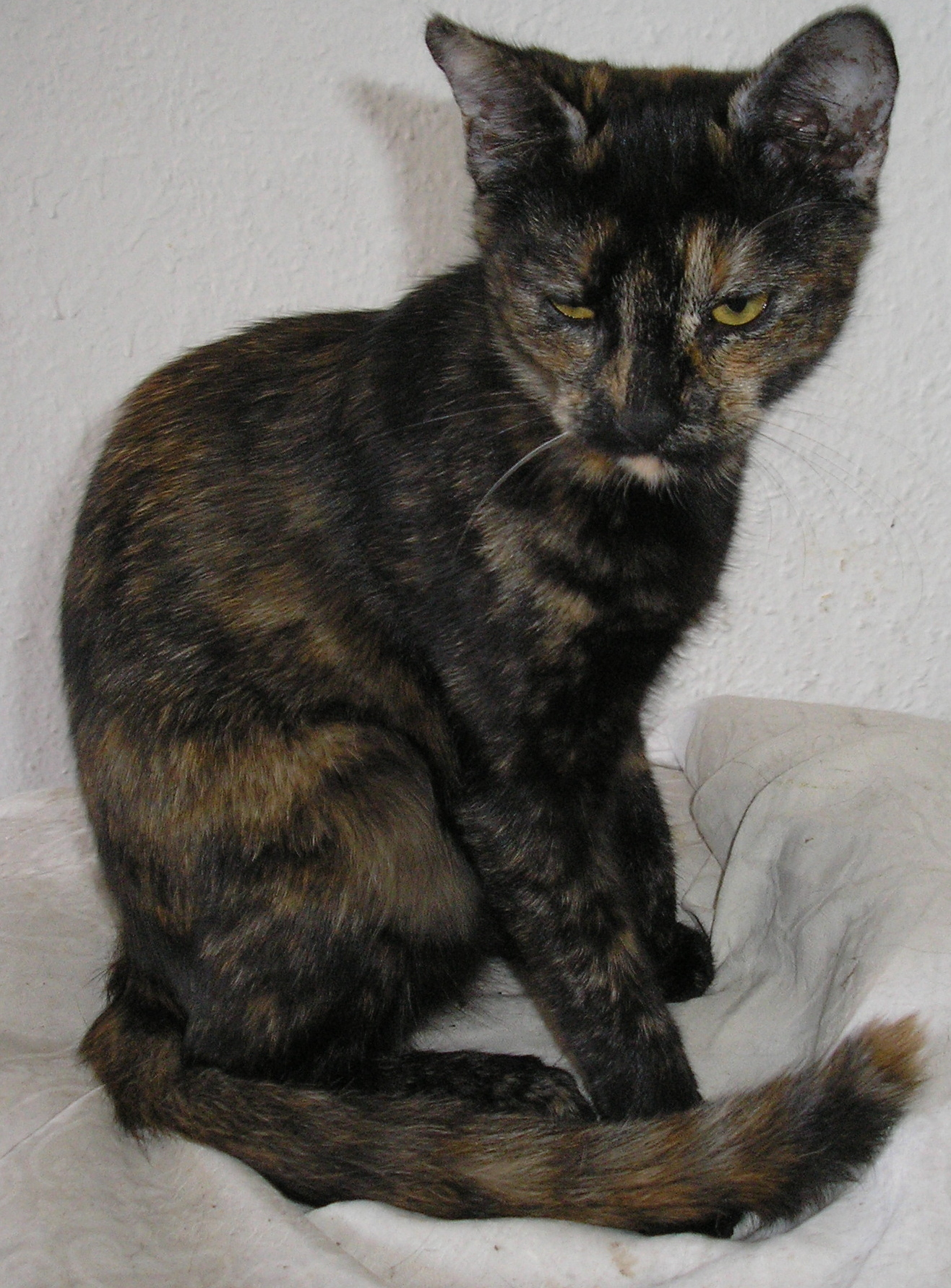 Teknőctarka házimacska